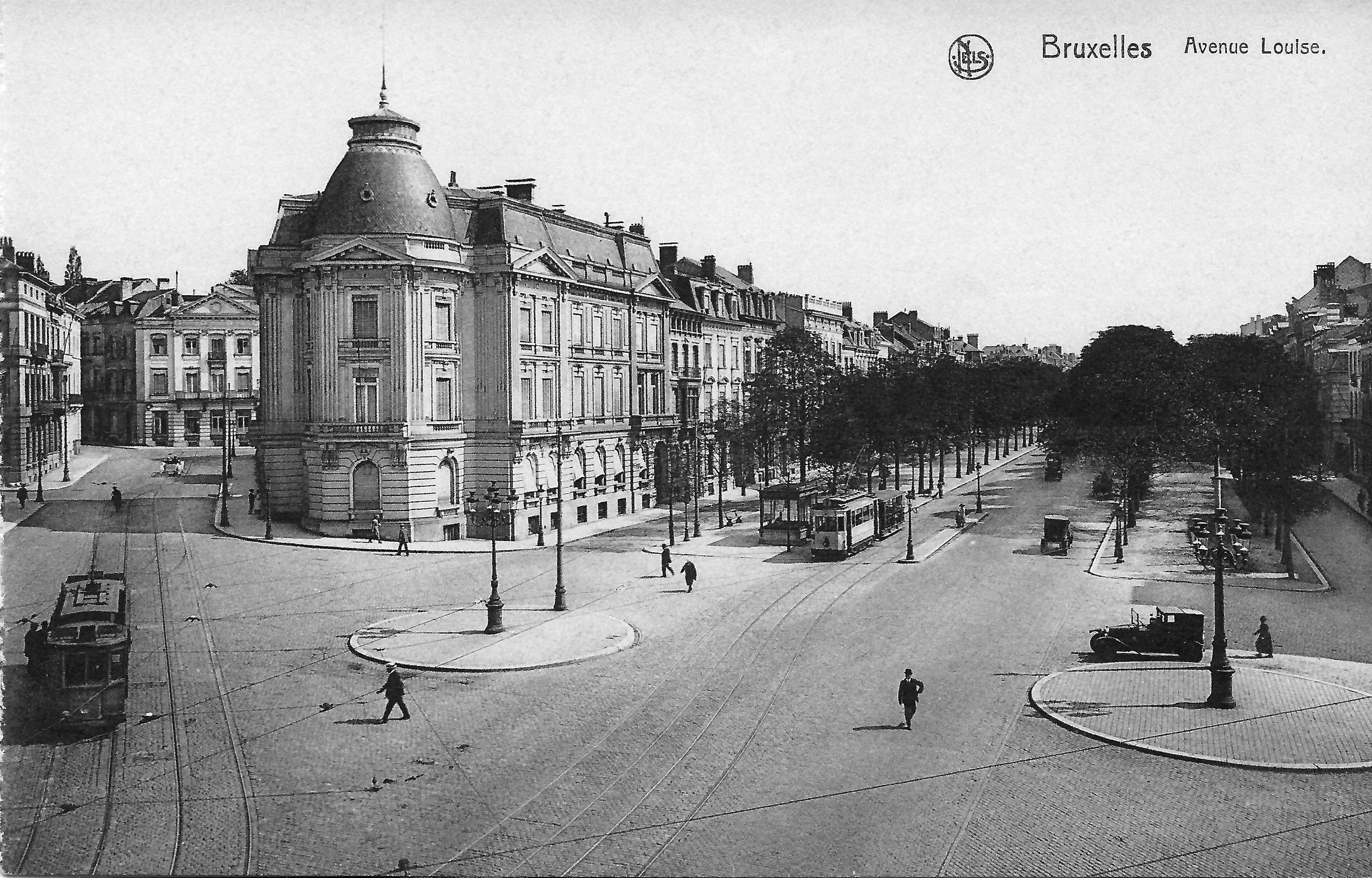 Carte postale: L'avenue Louise vers 1920, vue depuis la place Stéphanie.